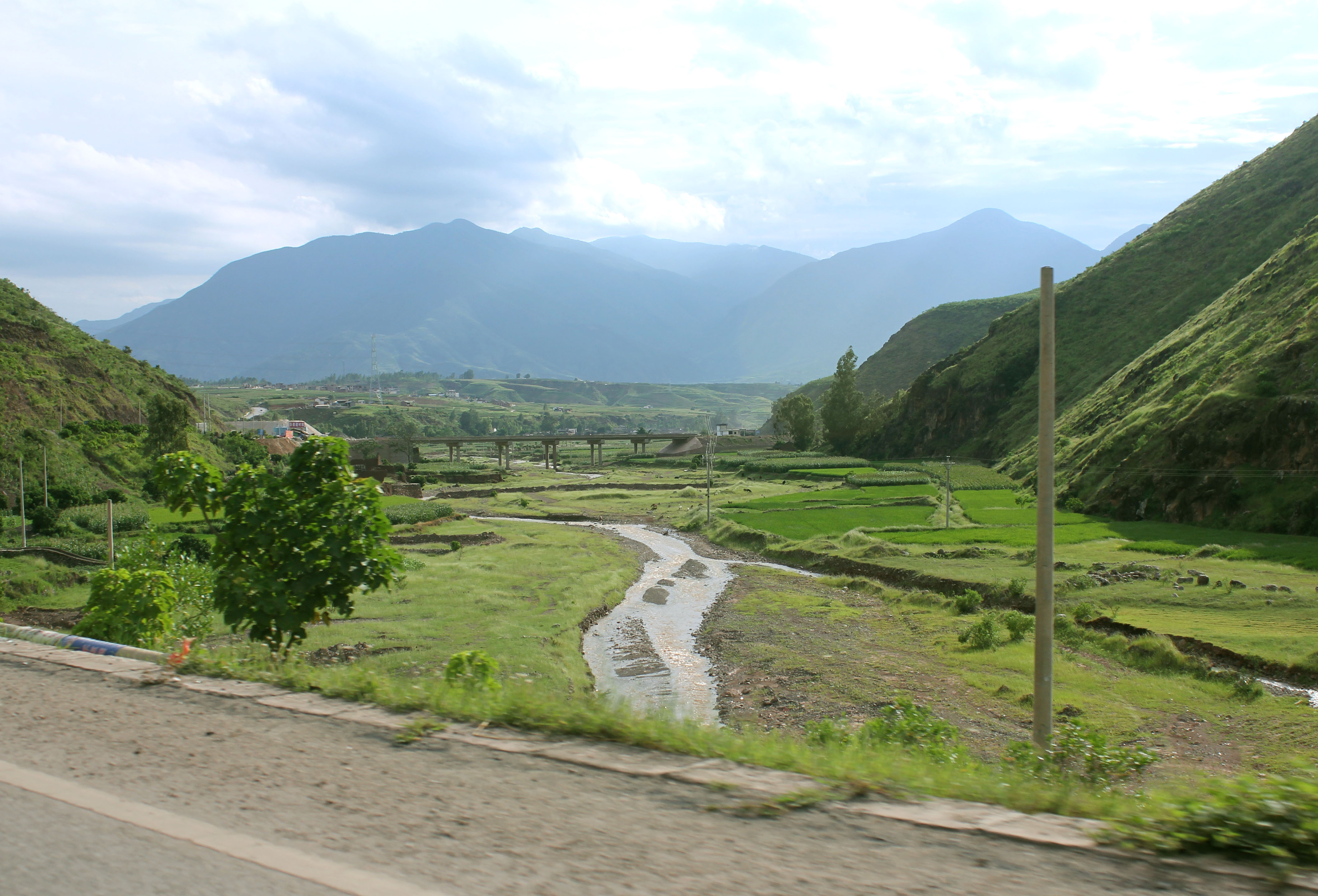 中国云南省永胜县涛源镇附近羊坪河，向南注入金沙江。